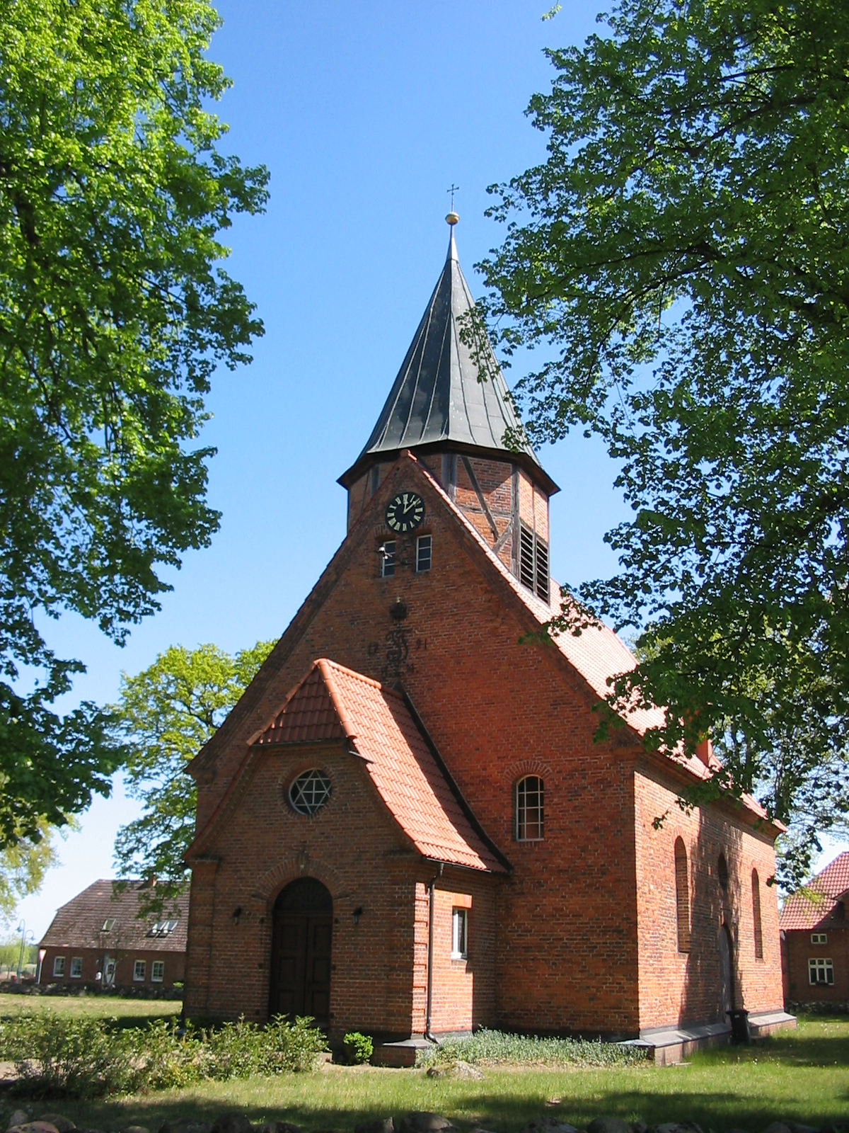 Kirche in Groß Laasch (Germany)